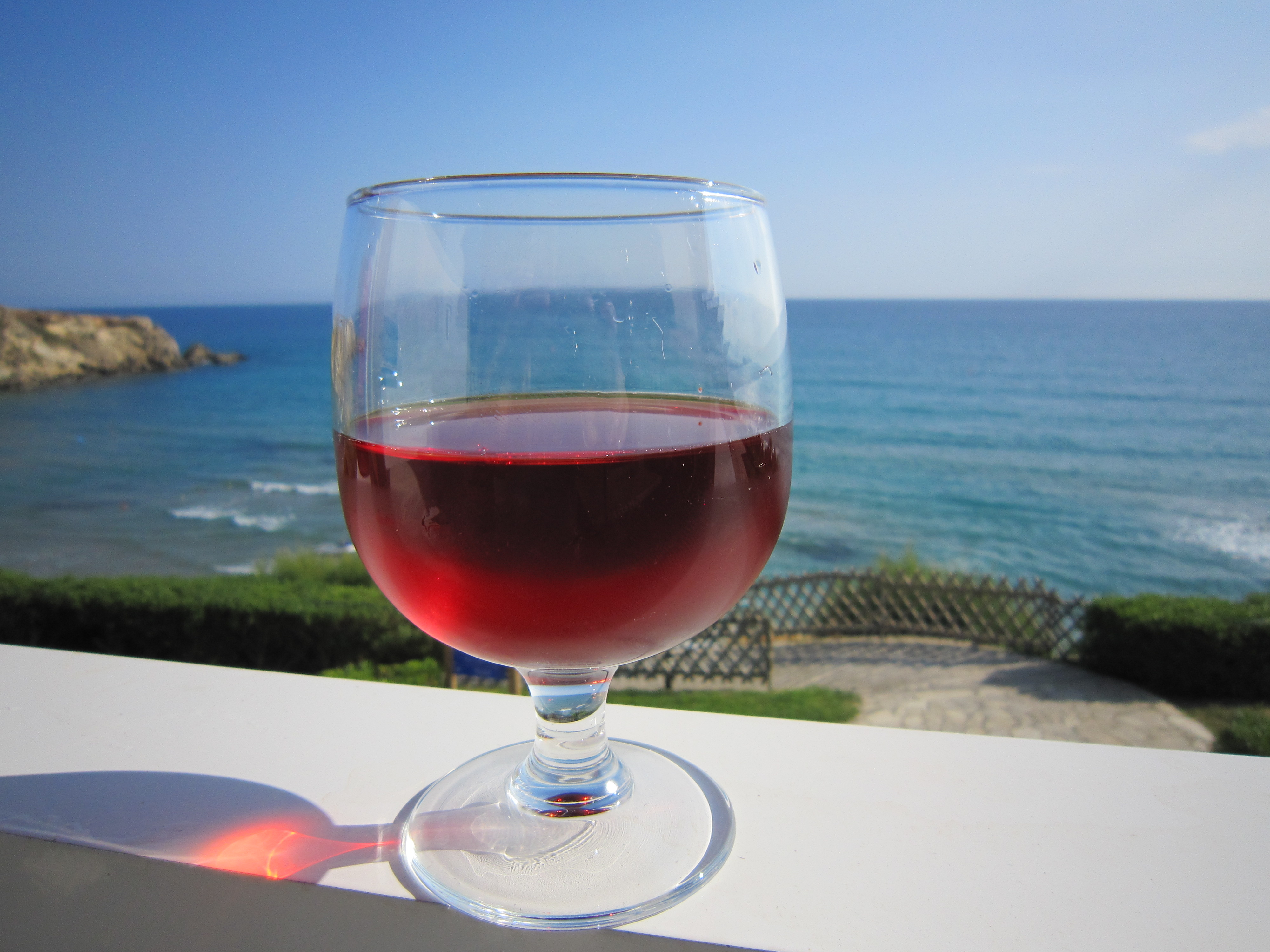 Vin rosé de Crète